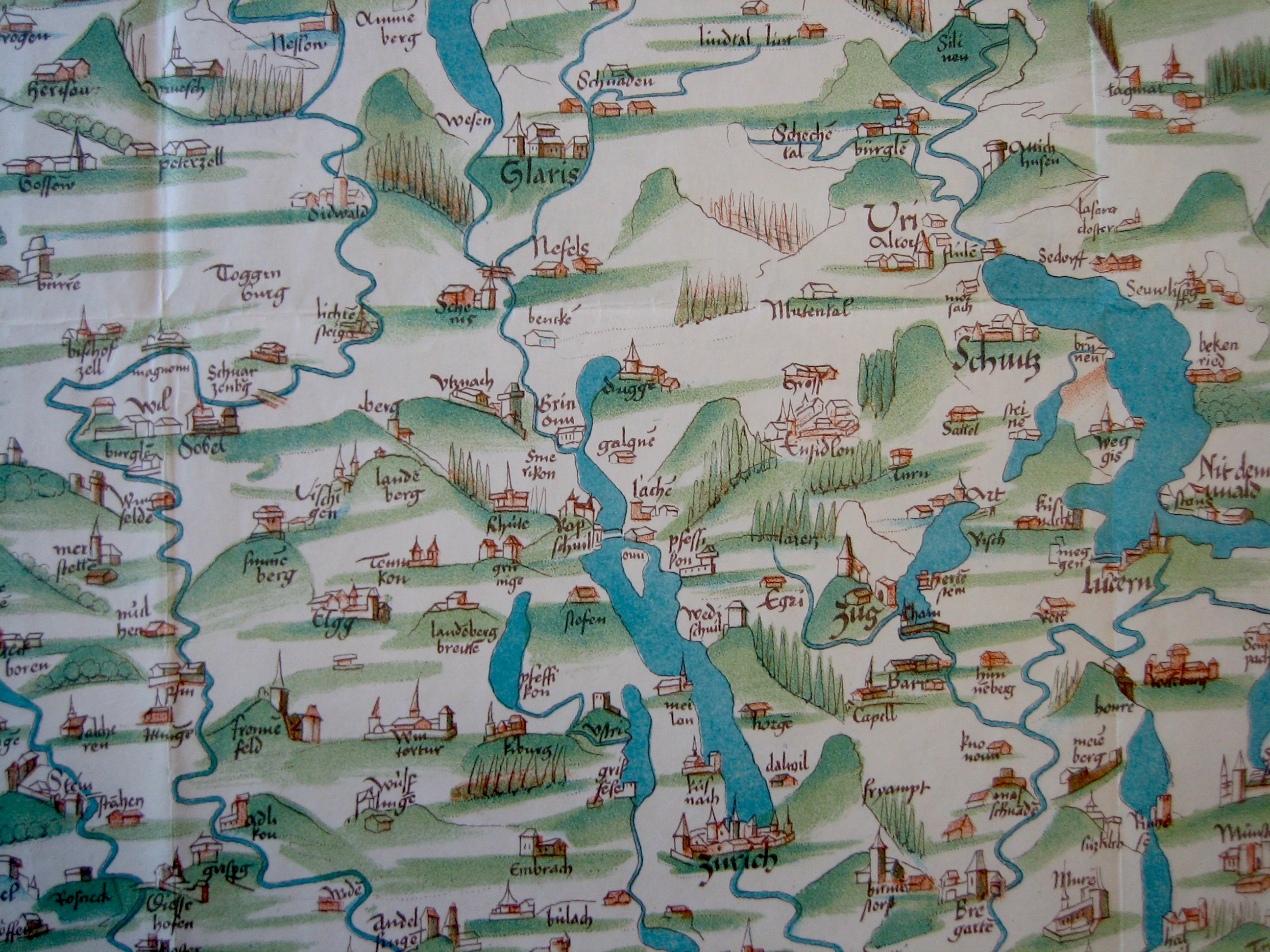 Ausschnitt aus der 'Karte der Eidgenossenschaft' von Konrad Türst, 1495/1496 (Übertragung des Originals). In der Mitte der Zürichsee, oben der Walensee, rechts der Vierwaldstättersee